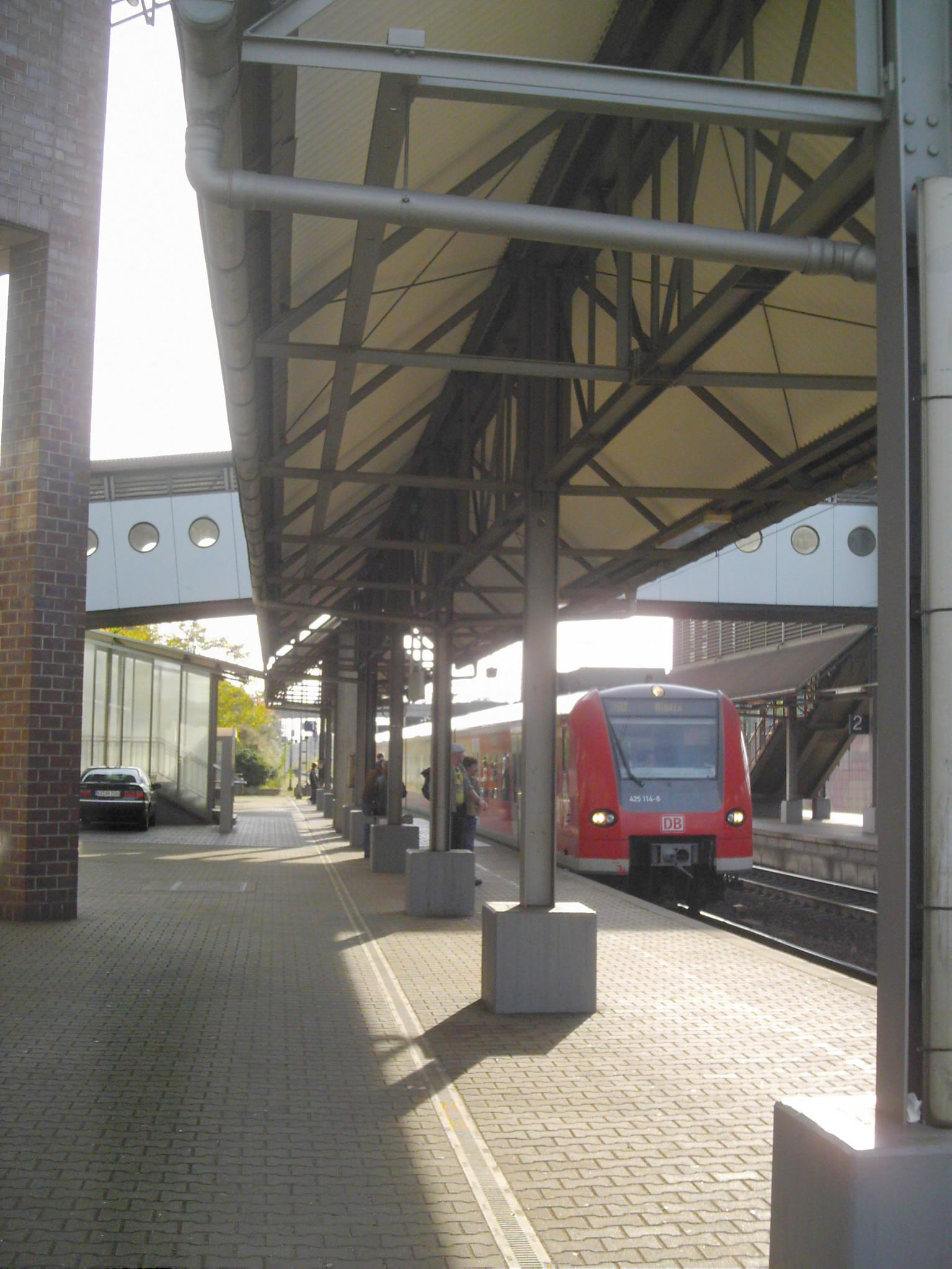 Rheintalbahn – Bahnhof Hockenheim